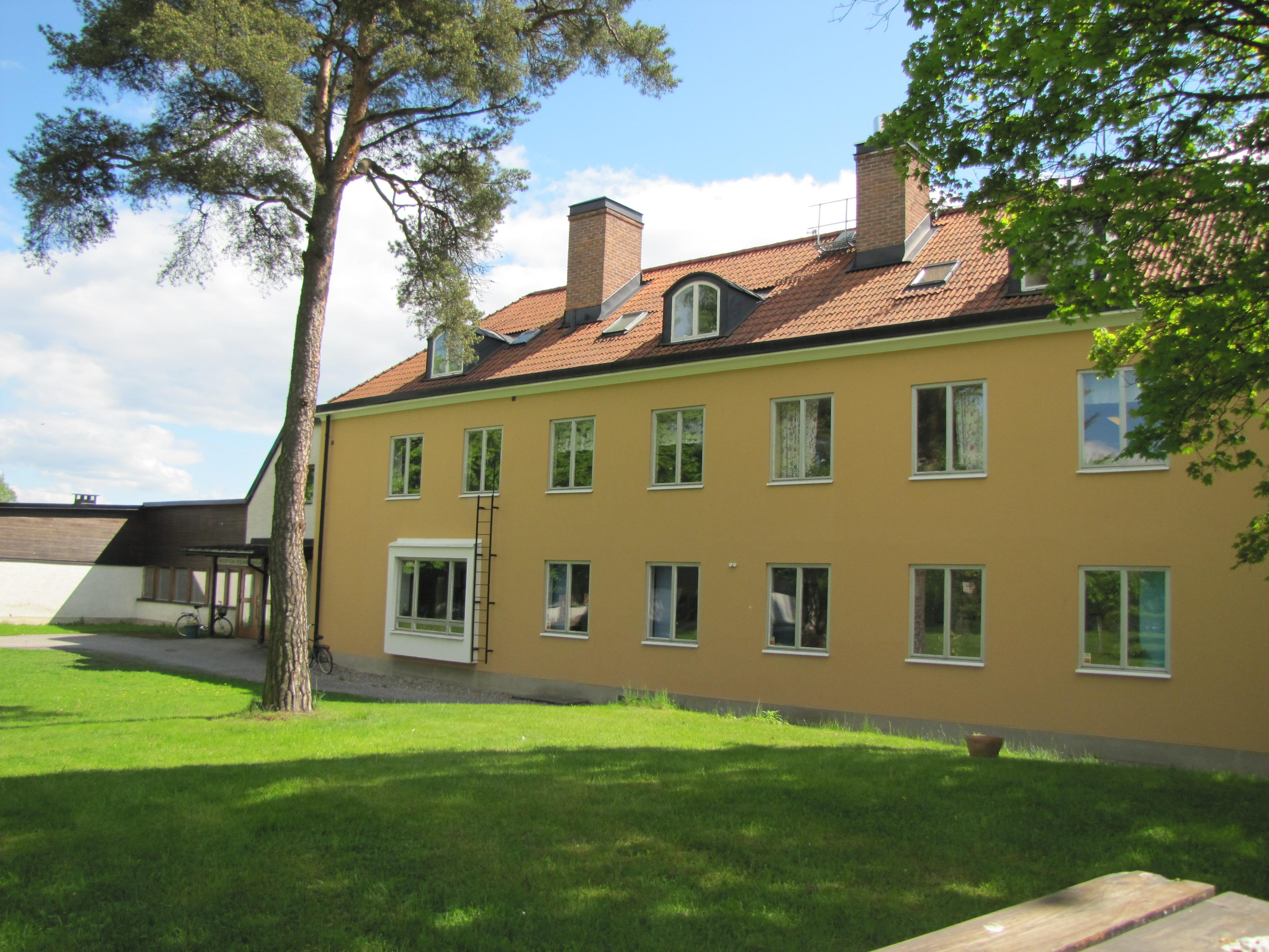 Bilden föreställer även denna GHagabergs folkhögskola.